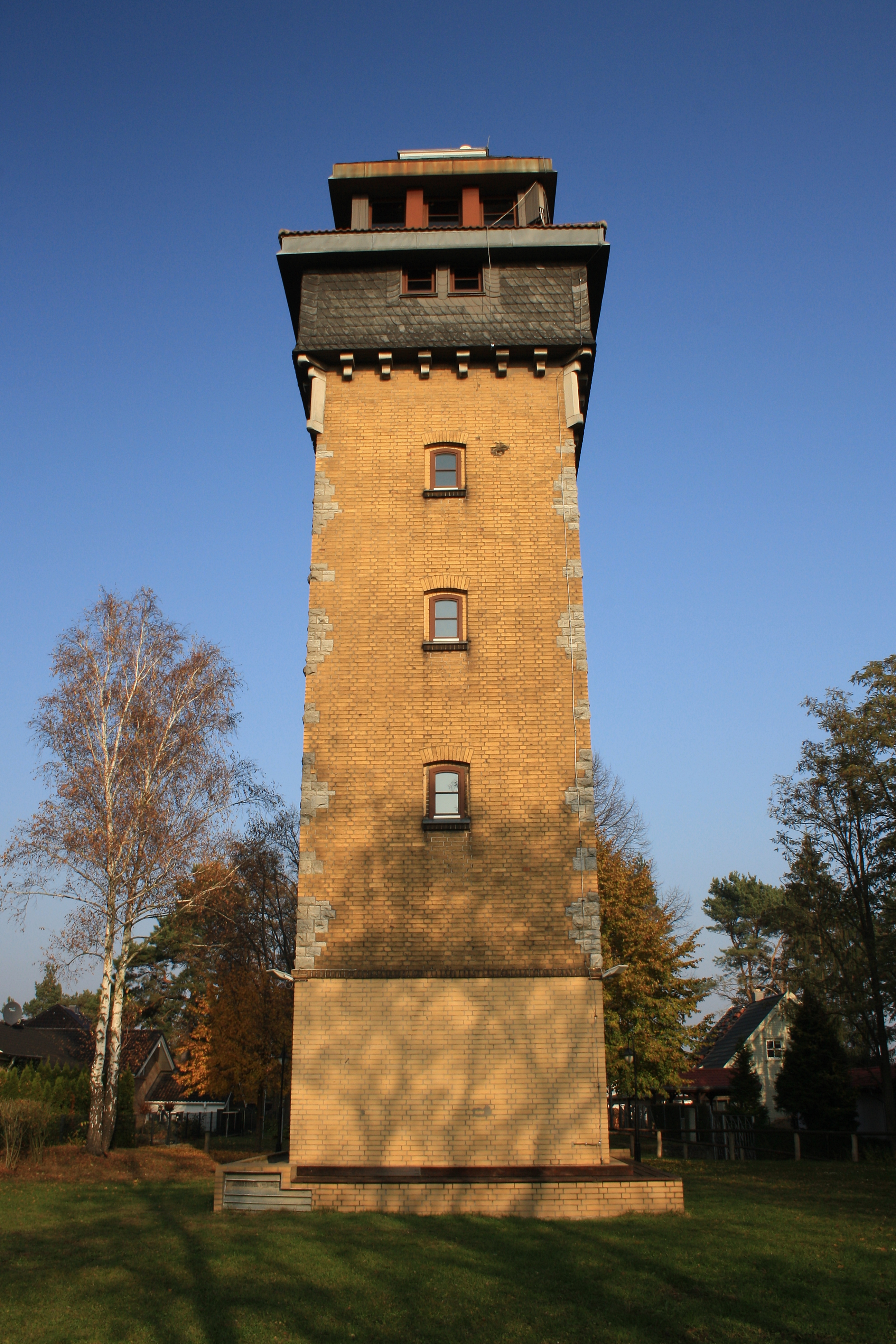 Wachtelturm auf dem Wachtelberg in Hennickendorf (Rüdersdorf)